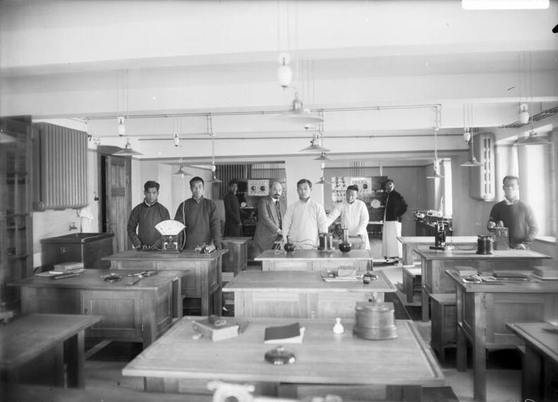 Schutzgebiet Kiautschou 1913: Tsingtau; Chem. Labor der Hochschule